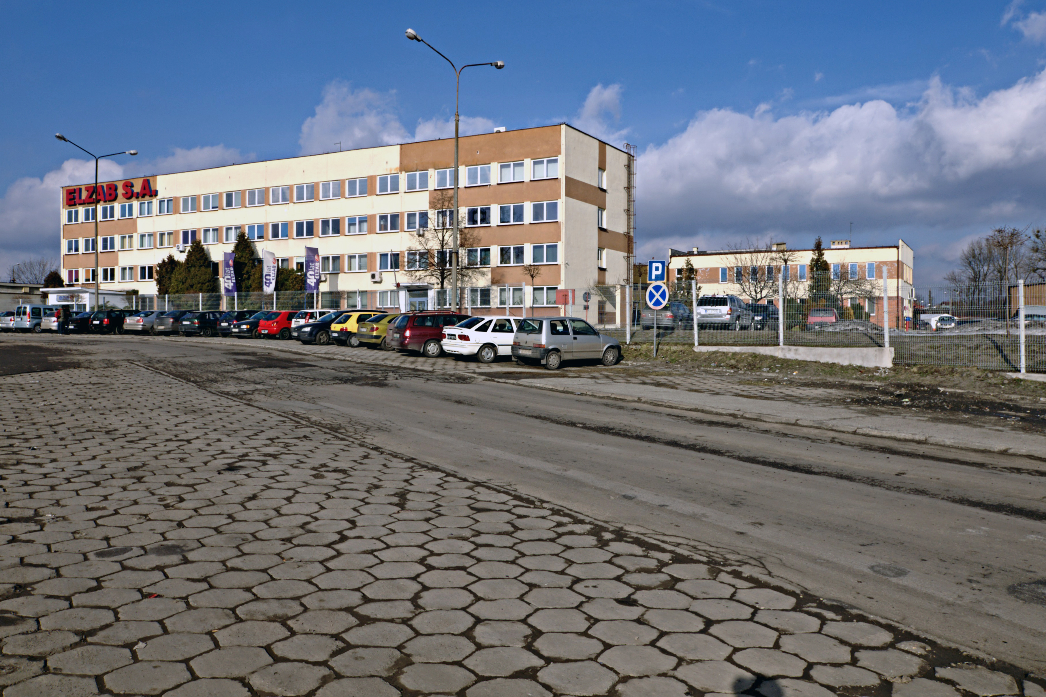 Ulica Kruczkowskiego w Zabrzu. Zakłady Elzab.